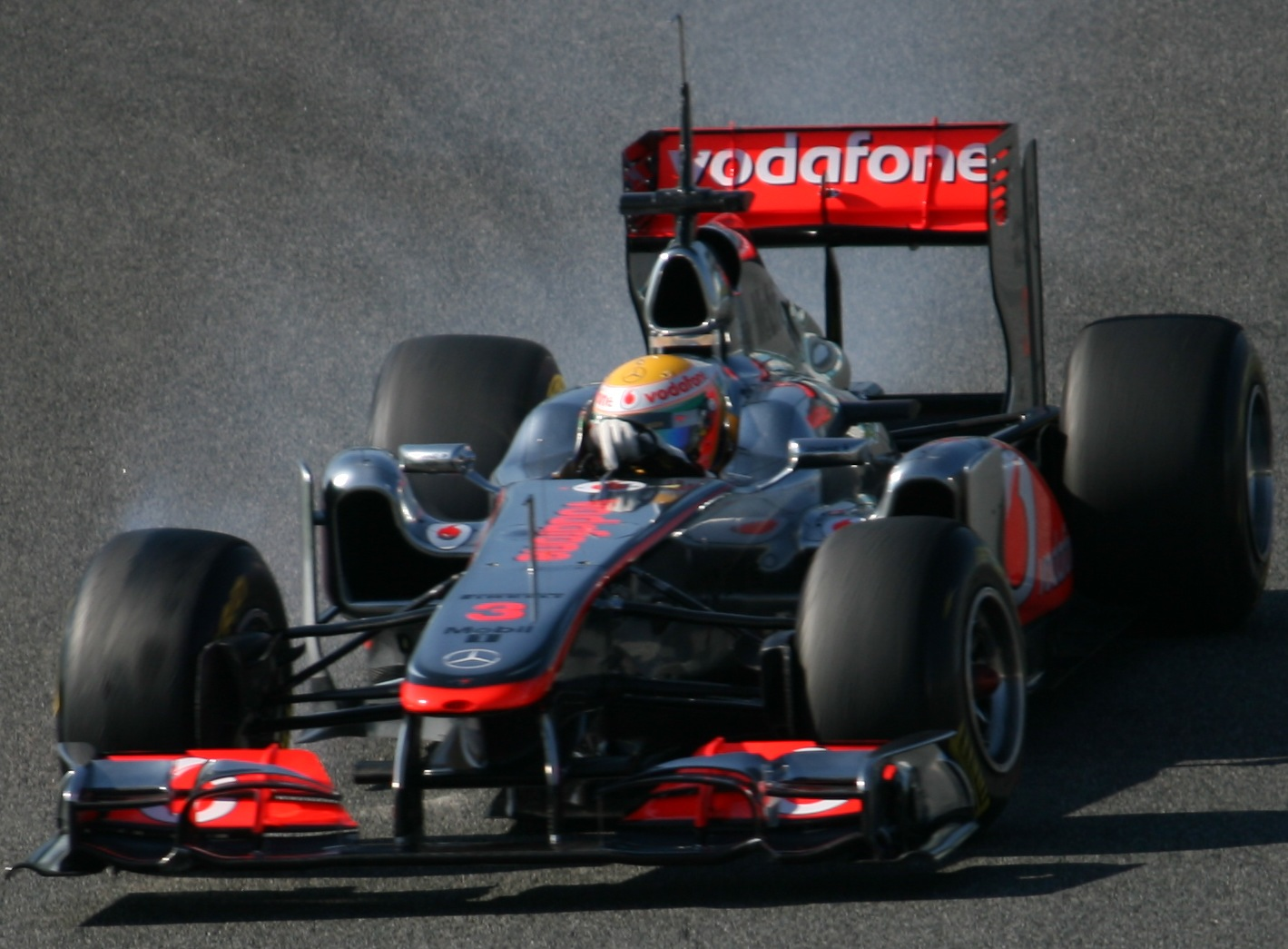 Lewis Hamilton